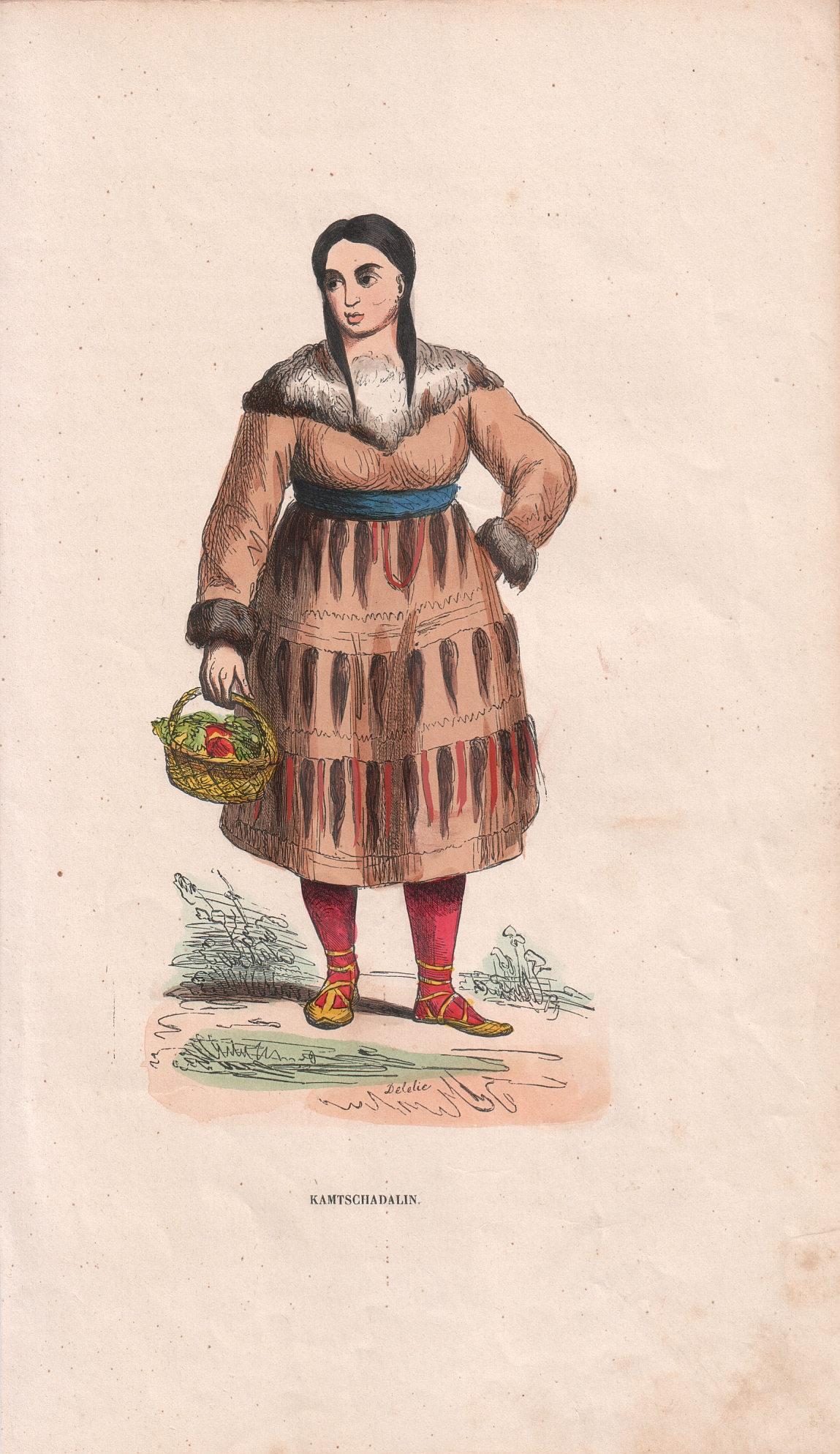 Kamtschadalin. Sarytschew. Russland. Handkolorierte Lithografie aus Heinrich Karl Wilhelm Berghaus "Die Völker des Erdballs nach Ihrer Abstammung und Verwandschaft und Ihrer Eigenthümlichkeiten in Regierungsform, Religion, Sitte und Tracht". Brüssel u. Leipzig. Muquardt 1845-47. Blattgrösse 24,8 x 16,5 cm.